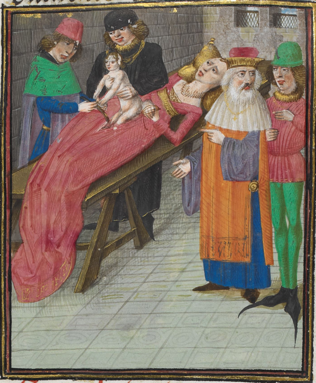 Miniature from Commentaires de César, f. 32r.